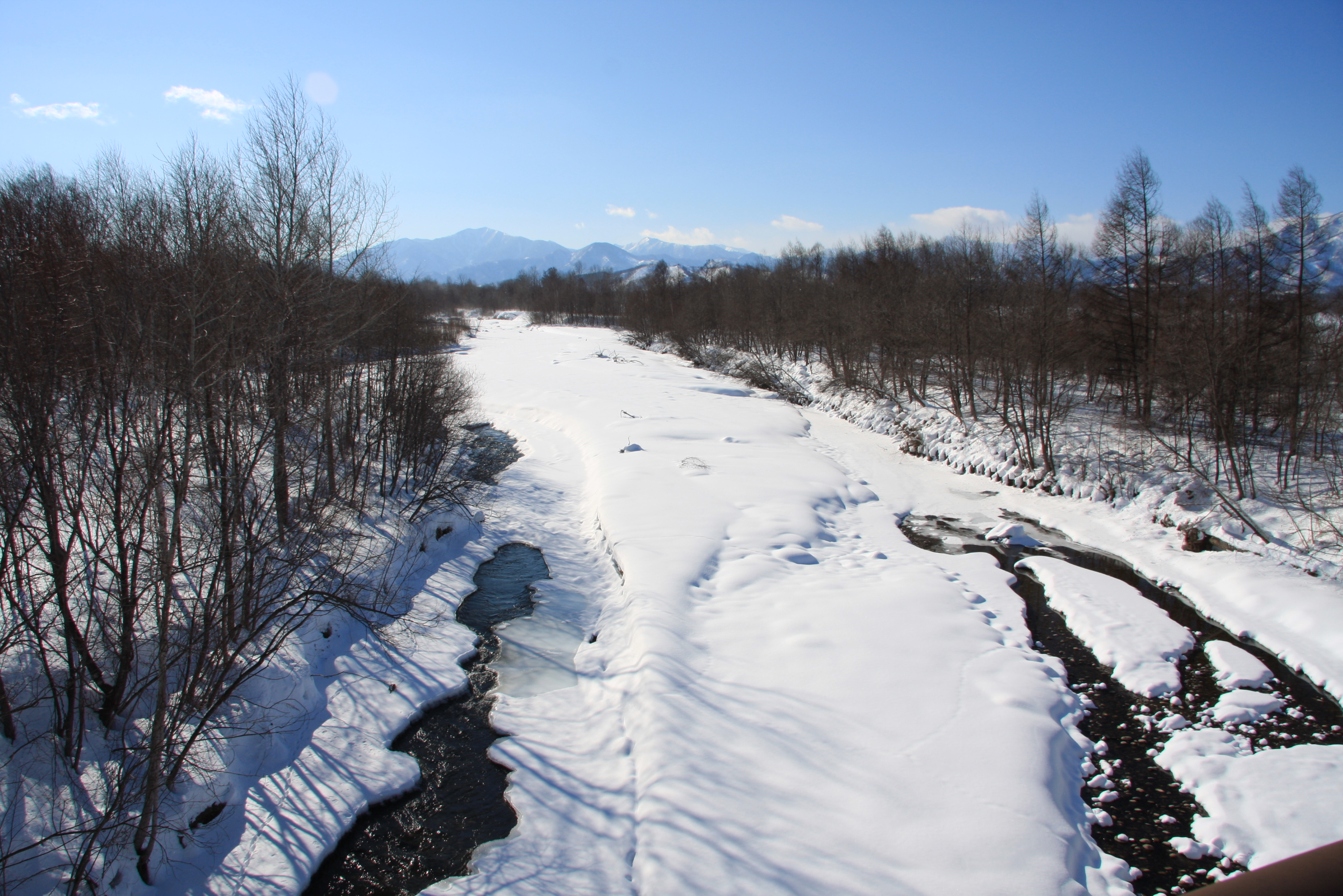 美生川 十勝幌尻岳を遠望